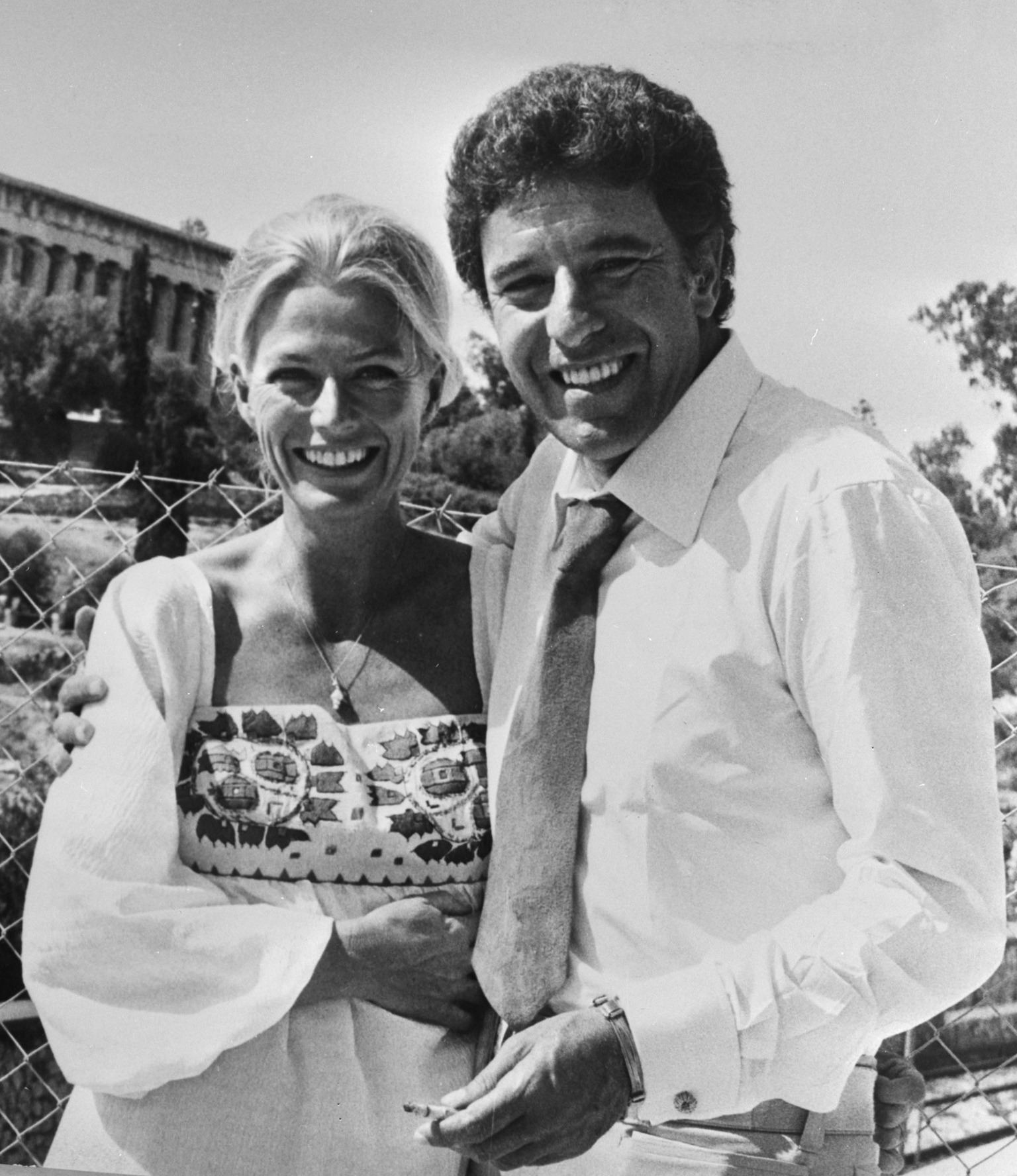 Nina van Pallandt en acteur Nikos Minardos maken filmopnamen in Athene; Nina van Pallandt en Nikos Minardos